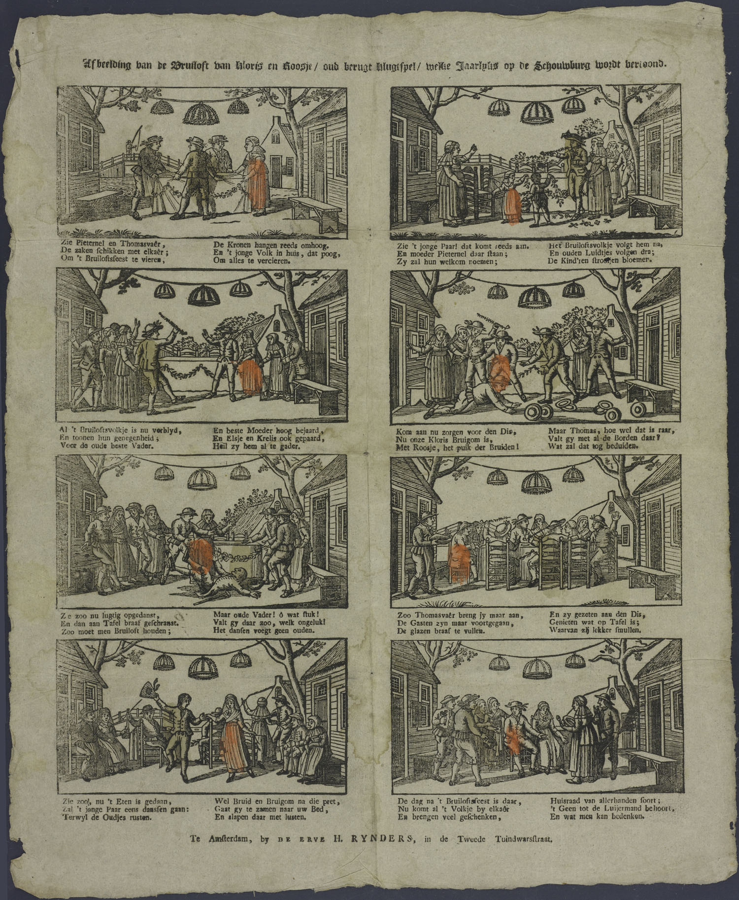 Centsprent met 4 x 2 omkaderde houtsneden, met afbeeldingen van een bruiloftsfeest, waar wordt gedanst, gegeten en gedronken. Thomas-vaar valt twee maal, en er wordt weer gedanst. Bruid en bruigom gaan dan samen naar hun bed en 'slapen daar met lusten'. De volgende dag worden geschenken gegeven. Bevat vierregelige rijmende onderschriften.